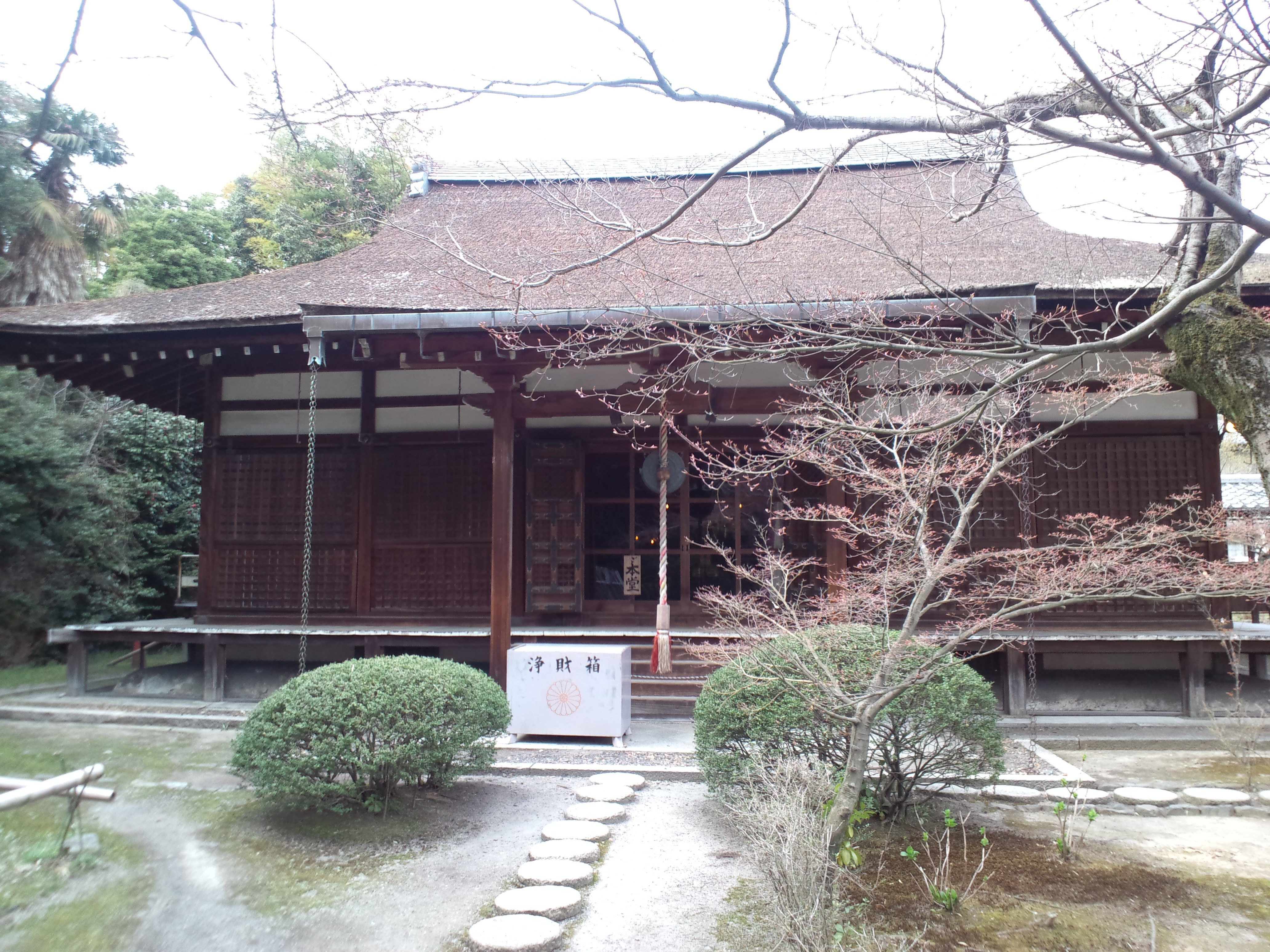 勧修寺 本堂